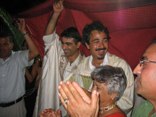 Marié de Djerba couvert par un beskri traditionnel